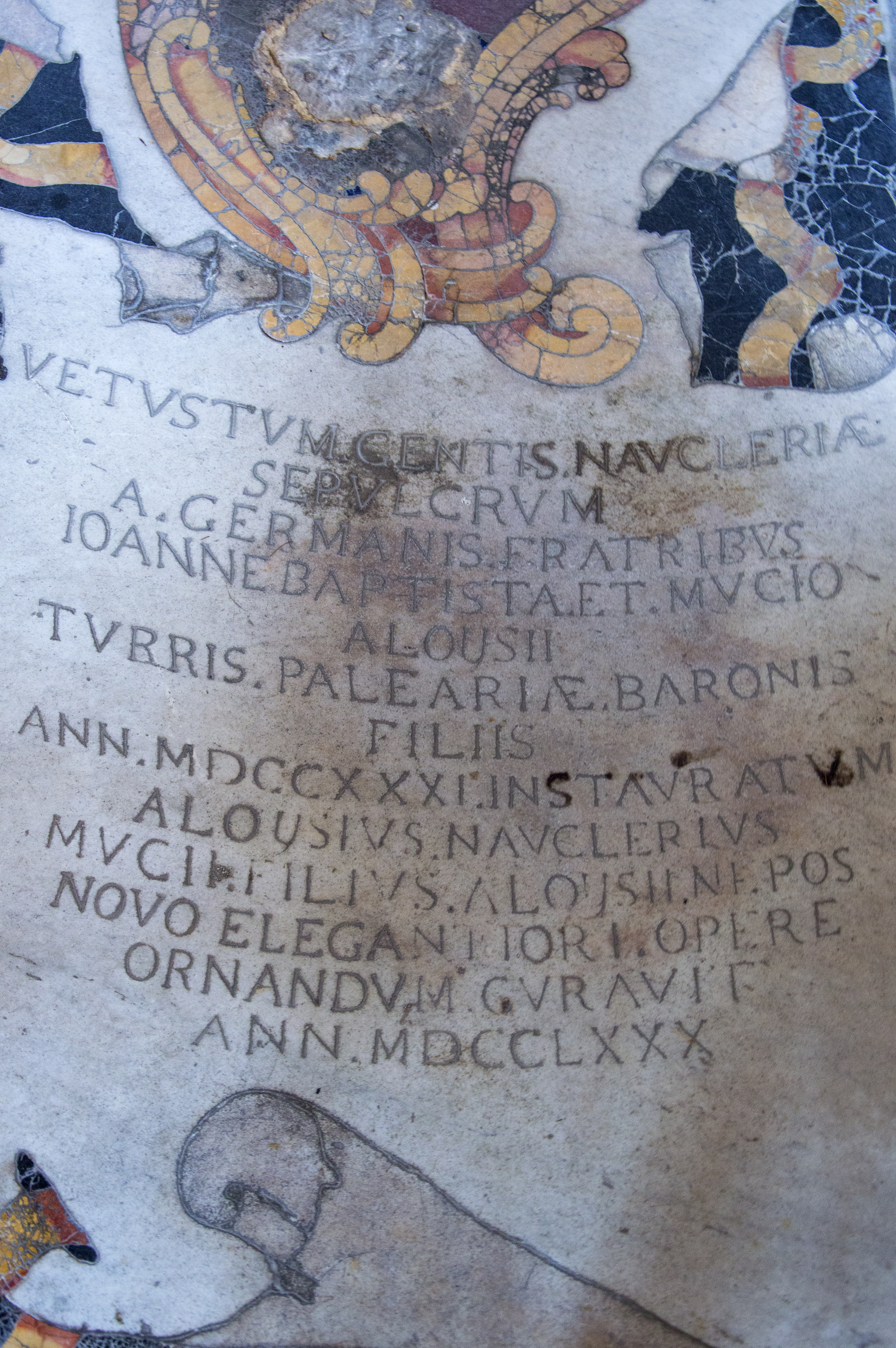 Lastra tombale in Cappella Nauclerio nella chiesa di Sant'Anna dei Lombardi recante il nome di Giovan Battista Nauclerio.